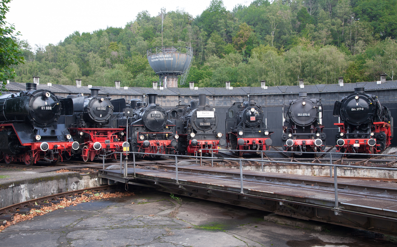 Lokomotiven des Eisenbahnmuseums Bochum vor dem Ringlokschuppen im Museumsgelände, dahinter Wasserturm